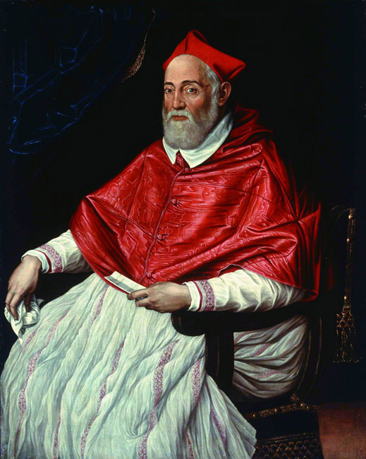 Ritratto di Alessandro Farnese il Giovane (1520-1589)